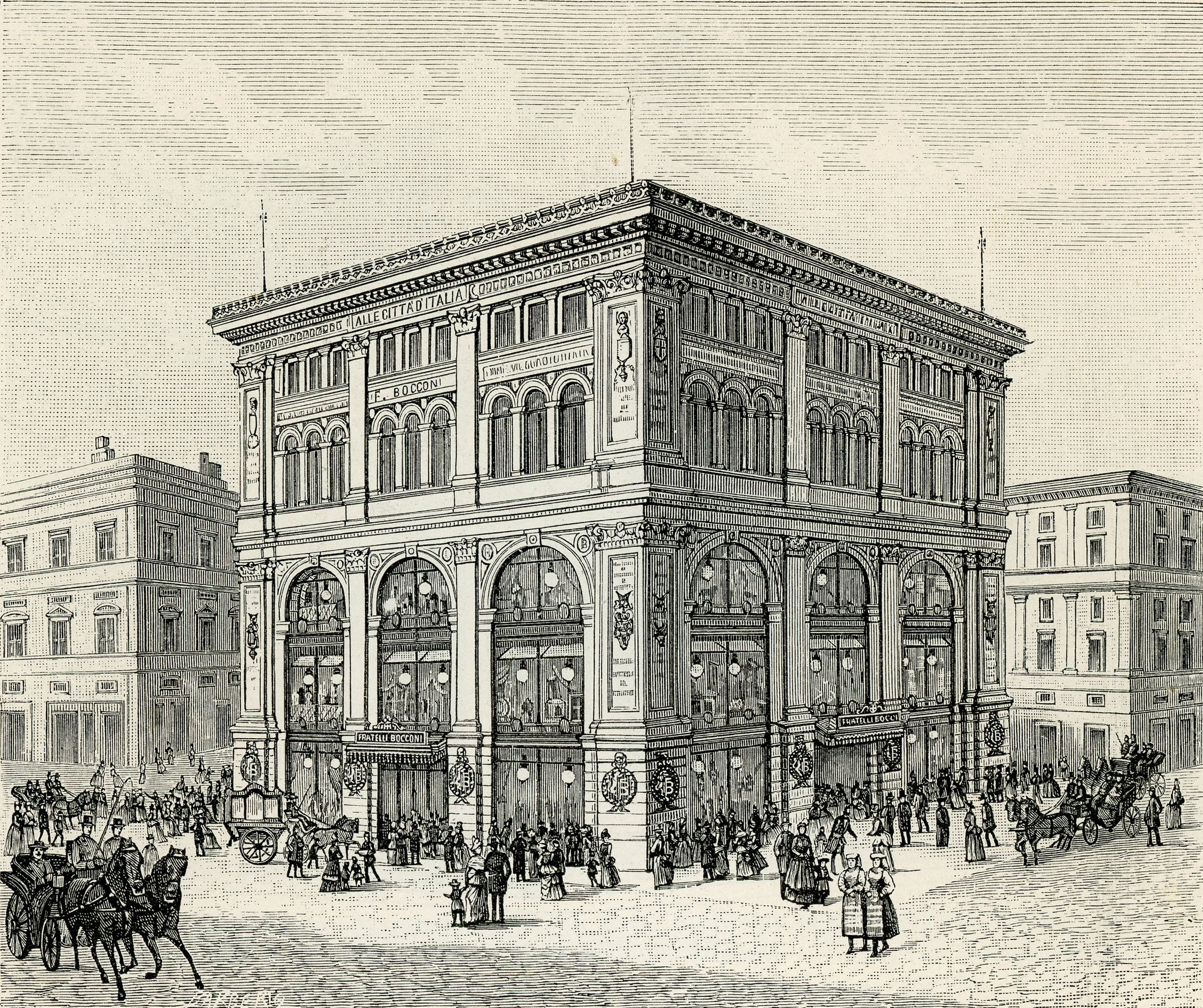 Roma: Palazzo Bocconi (xilografia).